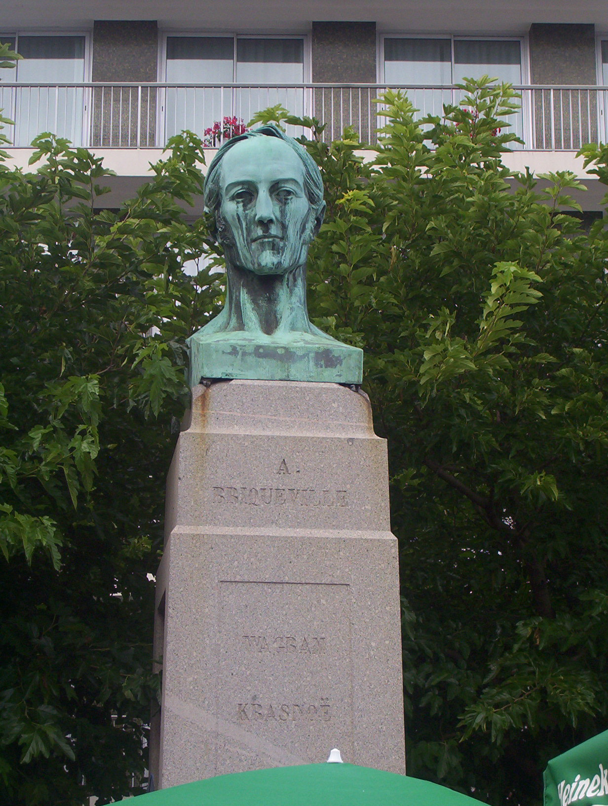 Cherbourg, France : Buste d'Armand_de_Bricqueville, colonel et député, par David_d'Angers.